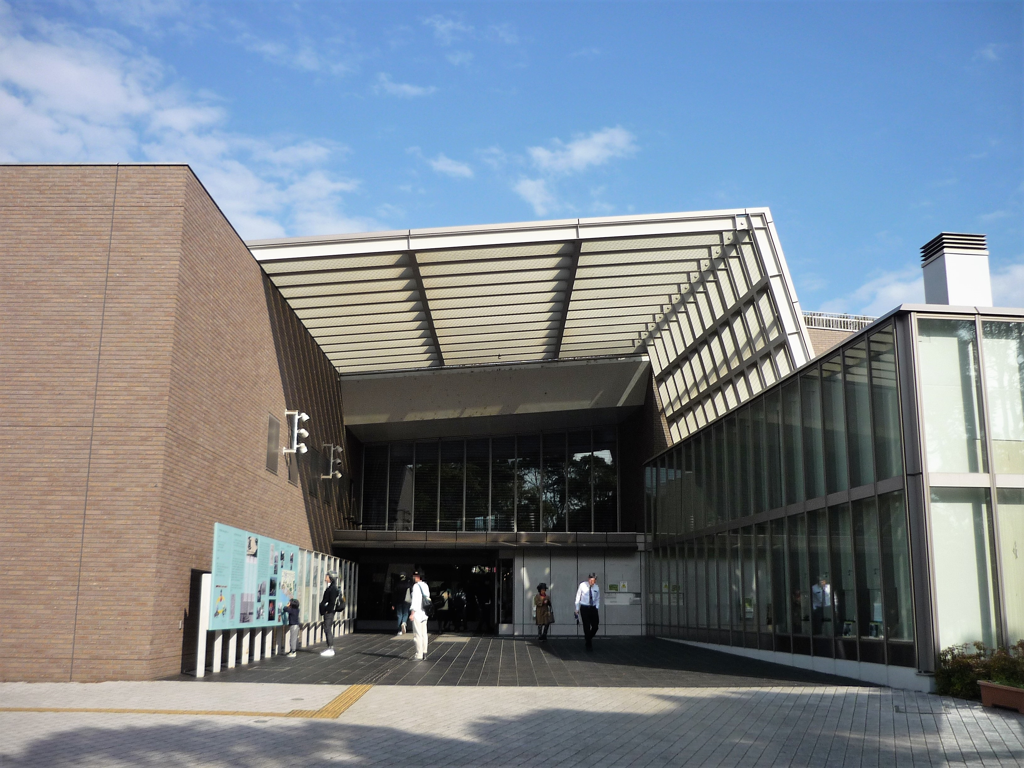 我孫子市民図書館 アビスタ本館 Panasonic Lumix DMC-FS3